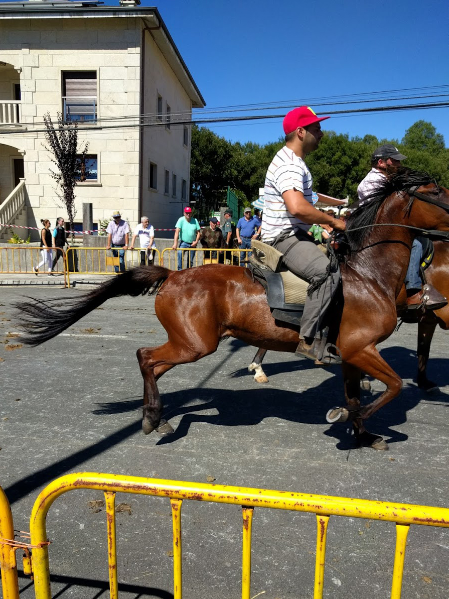 Festa dos Cabalos en Teixeiro, Curtis (Galiza).